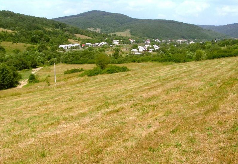 Celkový pohľad